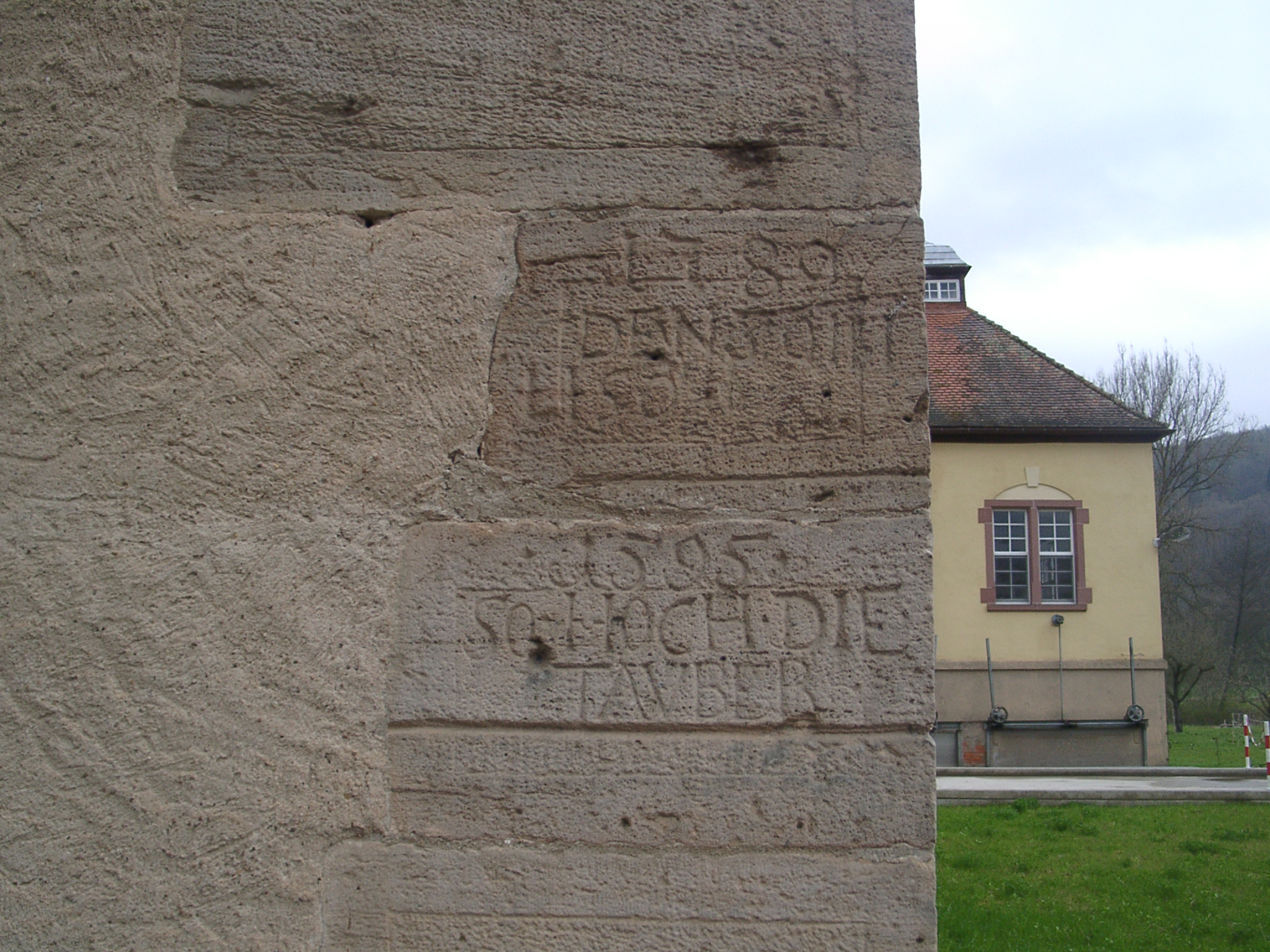 Hochwassermarken an der Eulschirbenmühle